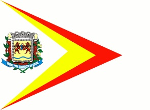 Bandeira da cidade de Fernandópolis, SP